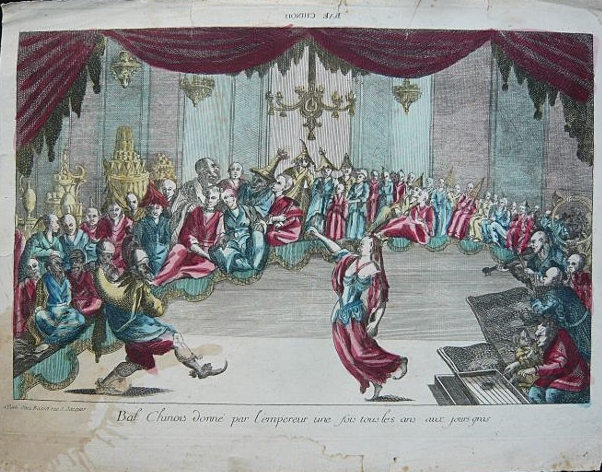 Bal chinois donné par l'empereur une fois tous les ans aux jours gras